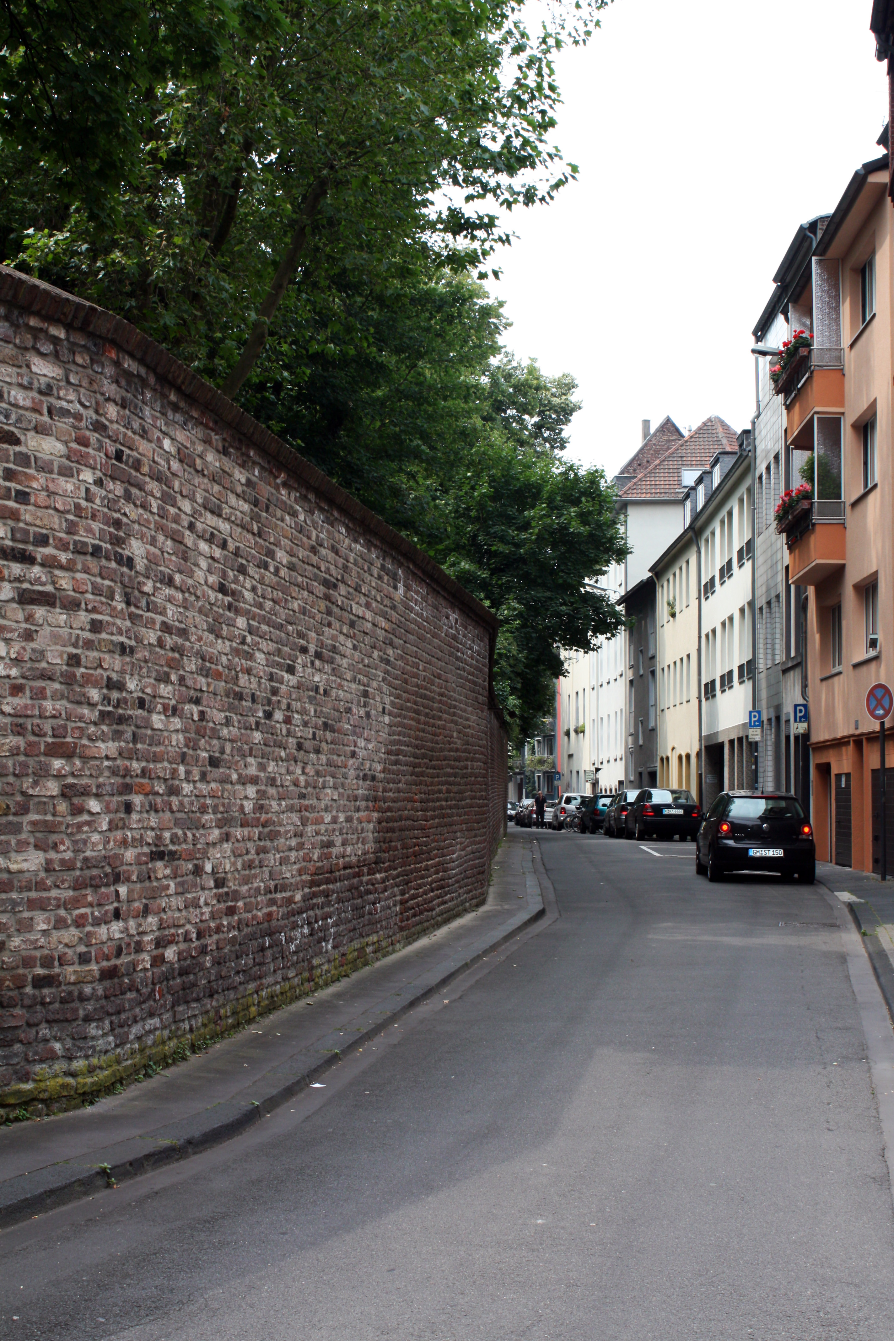 Erzbischöfliches Palais Köln, Umfassungsmauer Nordseite "Altengrabengässchen"